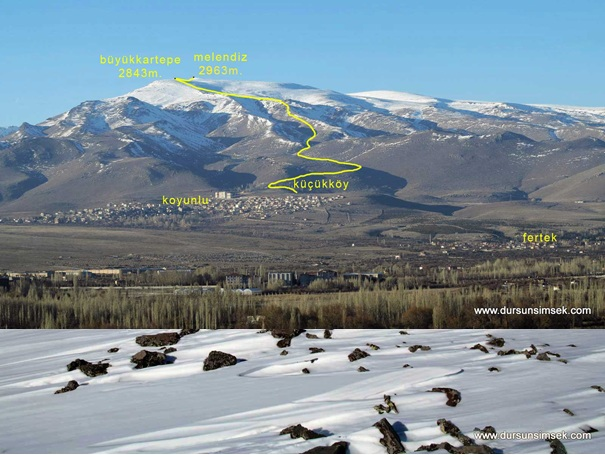 melendiz